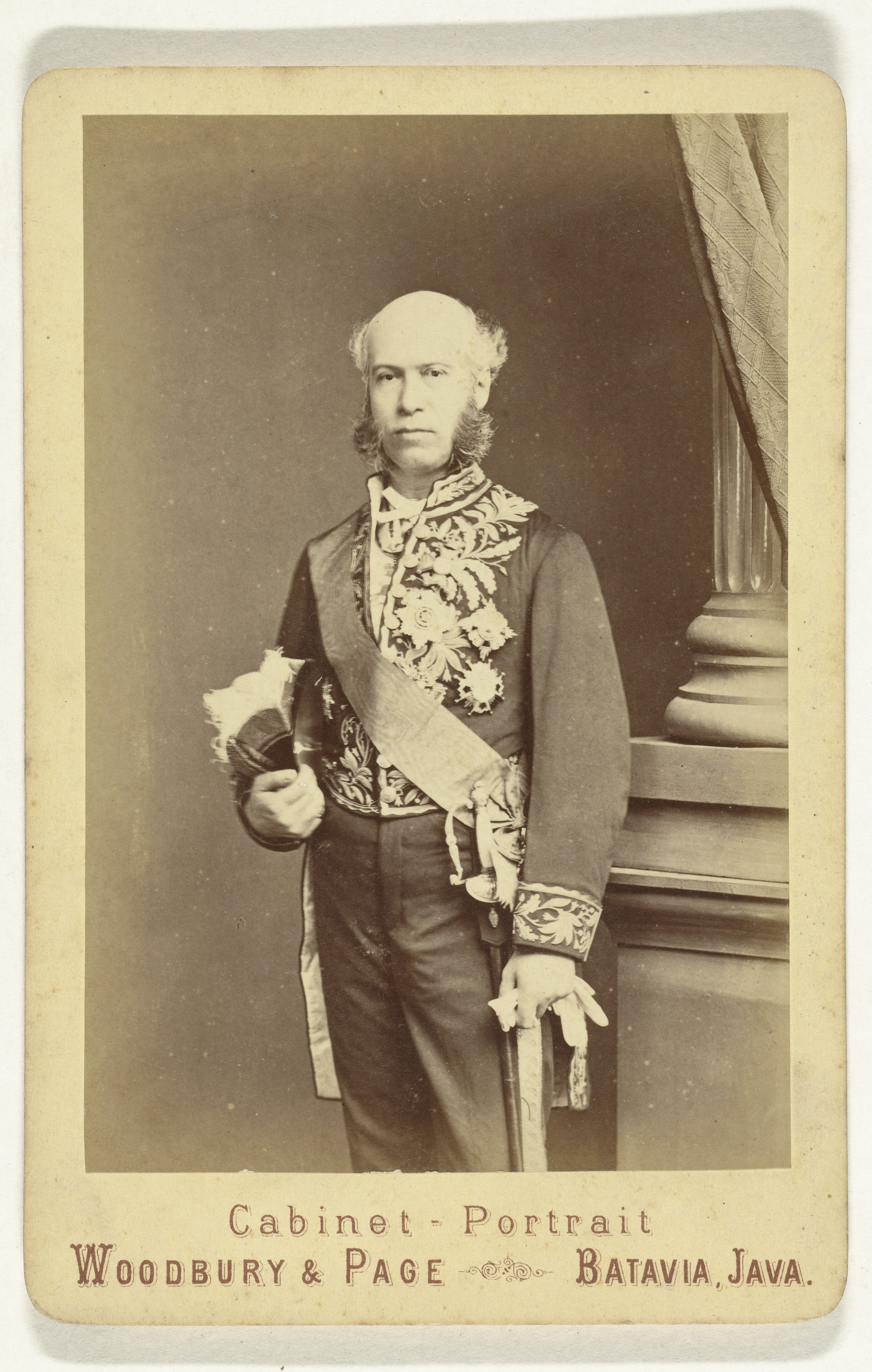 IdentificatieTitel(s): Portret van Mr. Johan Wilhelm van Lansberge, gouverneur-generaal van Nederlands-Indië, 1875-1881Objecttype: foto kabinetfoto Objectnummer: RP-F-2007-14-15VervaardigingVervaardiger: fotograaf: Woodbury & Page (vermeld op object)Plaats vervaardiging: BataviaDatering: ca. 1875 - ca. 1881Fysieke kenmerken: albuminedrukMateriaal: papier fotopapier Techniek: albuminedrukAfmetingen: foto: h 136 mm × b 100 mmblad: h 165 mm × b 109 mmVerwerving en rechtenCredit line: Schenking van de Stichting Kessler-de LangeVerwerving: schenking 2007Copyright: Publiek domein